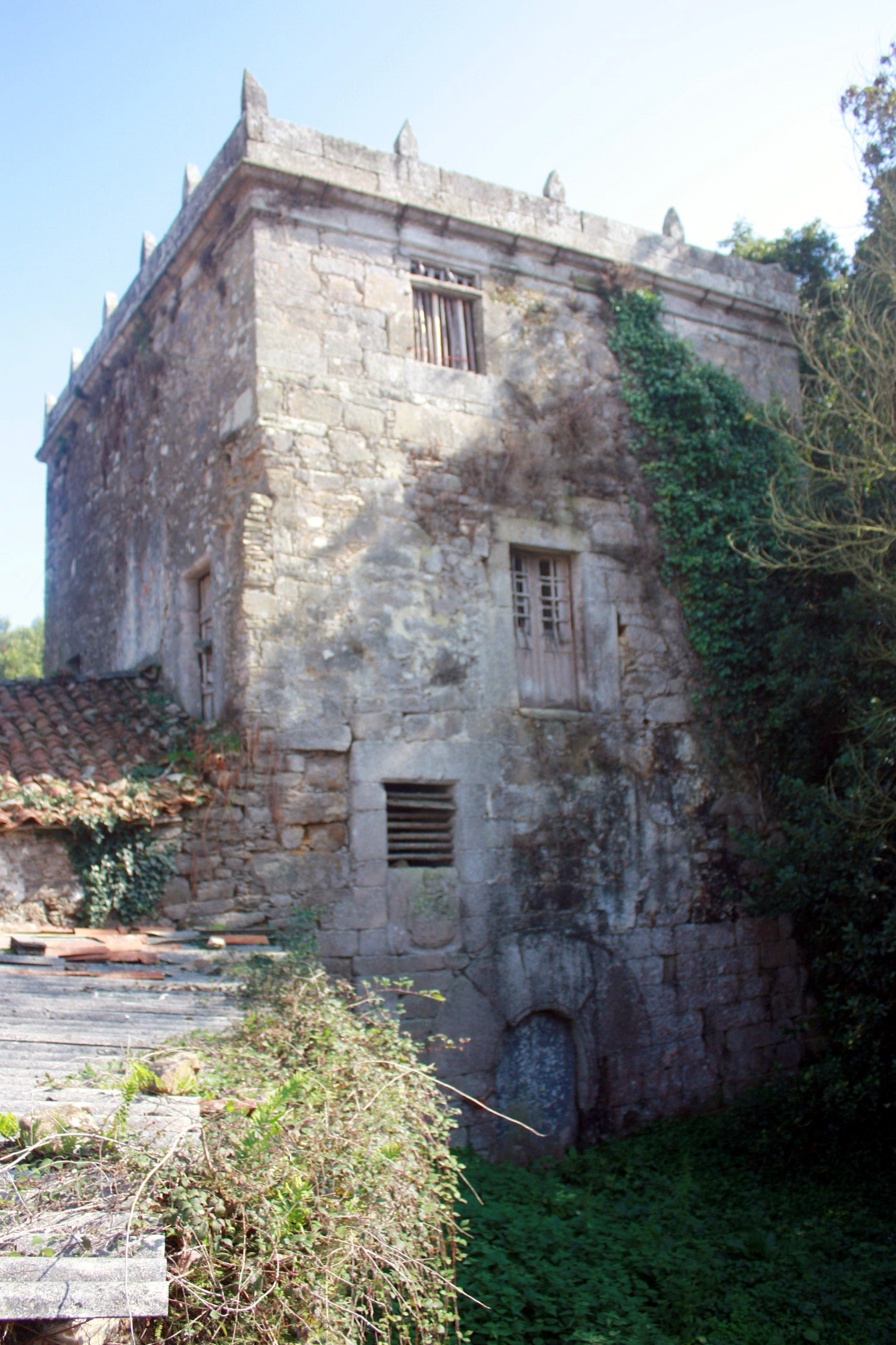 Torre da Penala, A Penela, A Silvarredonda, Cabana de Bergantiños (Cabana de Bergantiños).